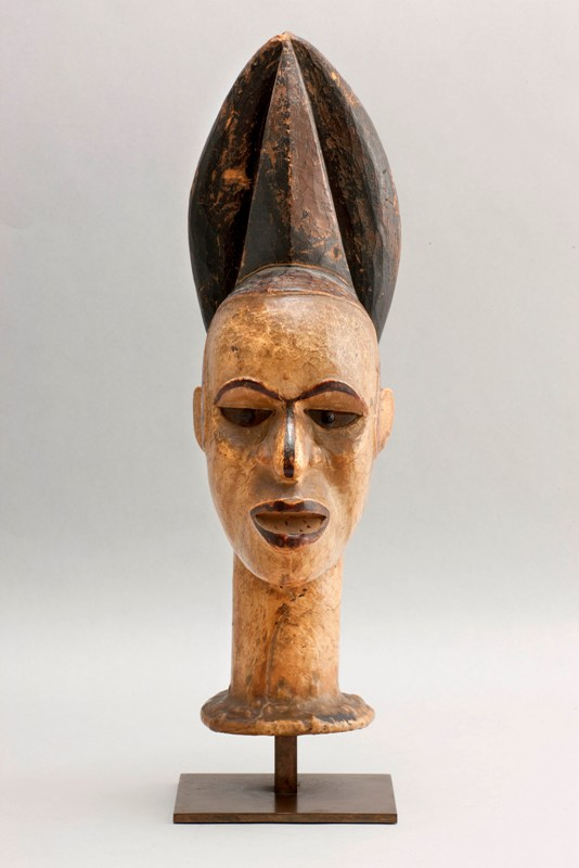 Maschera cimiero - La testa in legno ricoperta di pelle animale poggia su una base in fibre intrecciate che serve da punto di aggancio del costume. Il volto ovale e tendenzialmente realistico è di colore chiaro, con labbra, setto nasale e sopracciglia colorate in rosso. La bocca è aperta così come gli occhi marcati da due pupille nere. Sulla sommità acconciatura tinta nero. Presso gli Ejagham del Cross River la società Ngbe è un'associazione segreta di guerrieri che riveste anche funzioni commerciali e politiche. L'appartenenza di gruppo si costruisce intorno a un insieme di simboli condivisi, tra cui le maschere. Solitamente le maschere sono ricoperte di pelle di antilope ma si sono anche ritrovate maschere con pelle umana, cosa che fece ipotizzare allo studioso Leo Frobenius che in origine i guerrieri portassero sul capo non una maschera, ma la testa del nemico ucciso. La maschera è stata così interpretata come una forma di appropriazione del potere del morto.